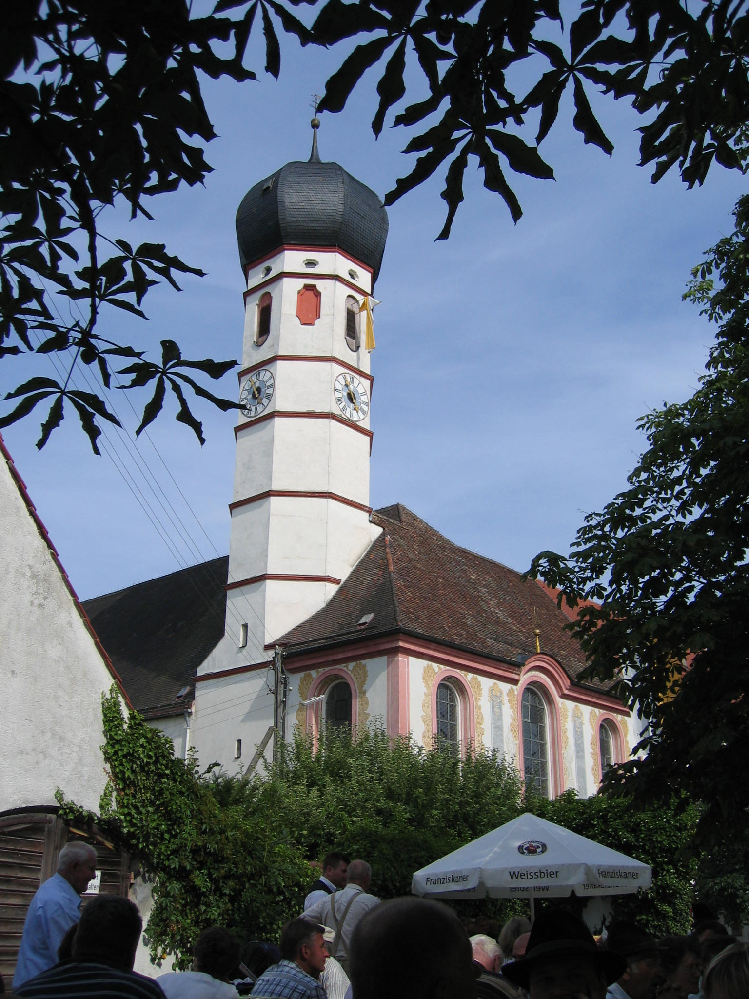 Patrozinium in Beuerberg